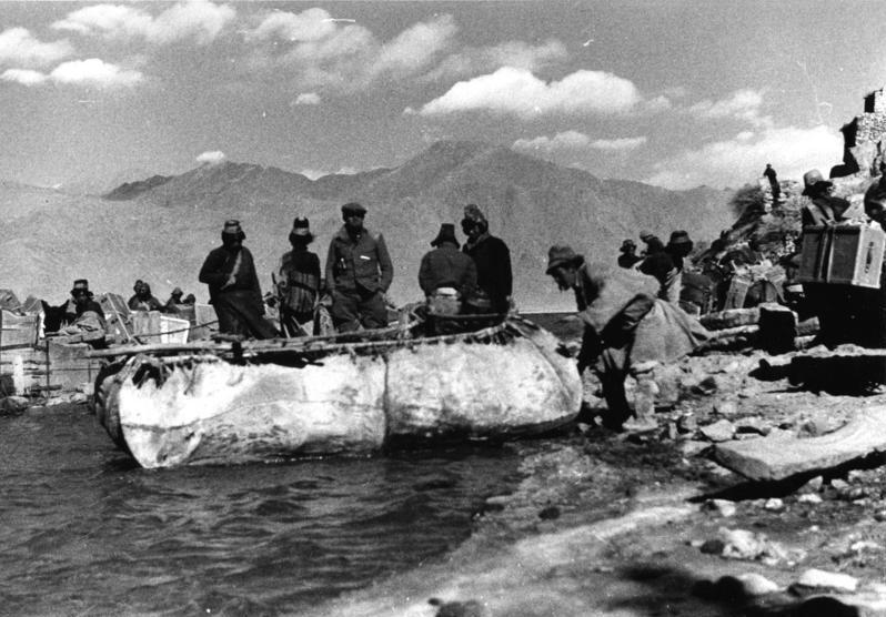 Tschagsam, Übersetzen über den Brahmaputra